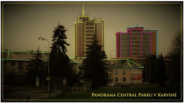 Panorama v centru Karviné